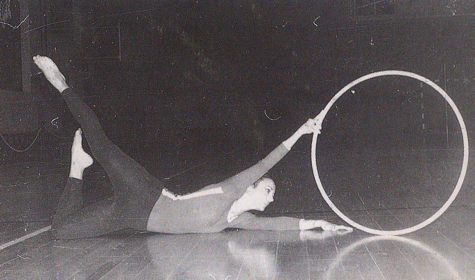 La gimnasta rítmica española Ernestina Lucea durante un ejercicio de aro en un entrenamiento, probablemente en 1973.